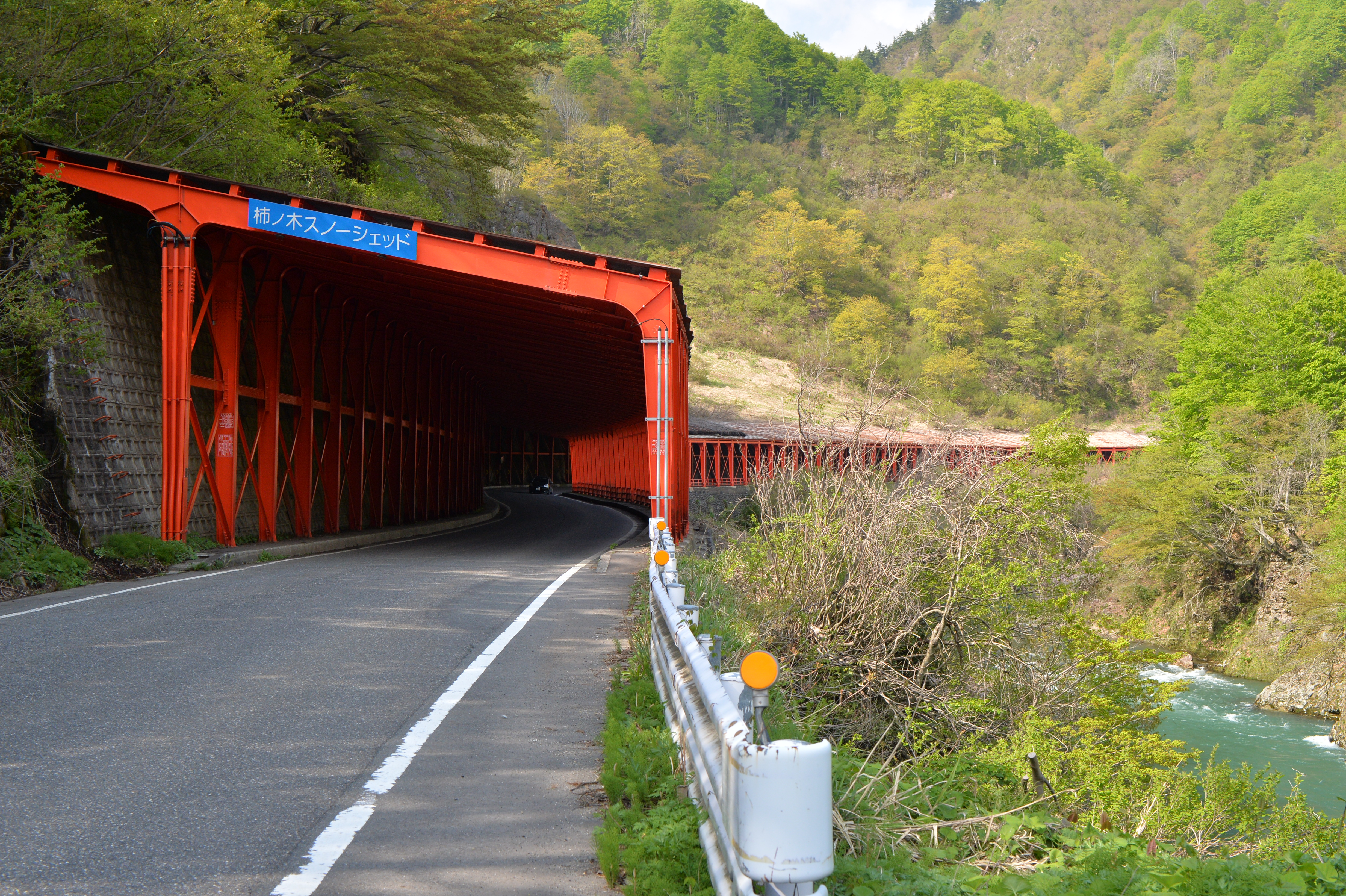 新潟県魚沼市穴沢の国道252号にある、柿ノ木スノーシェッド。